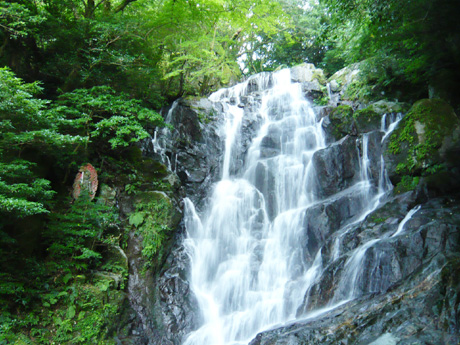 台湾式かき氷・そうめん流し・鮎の塩焼きが有名